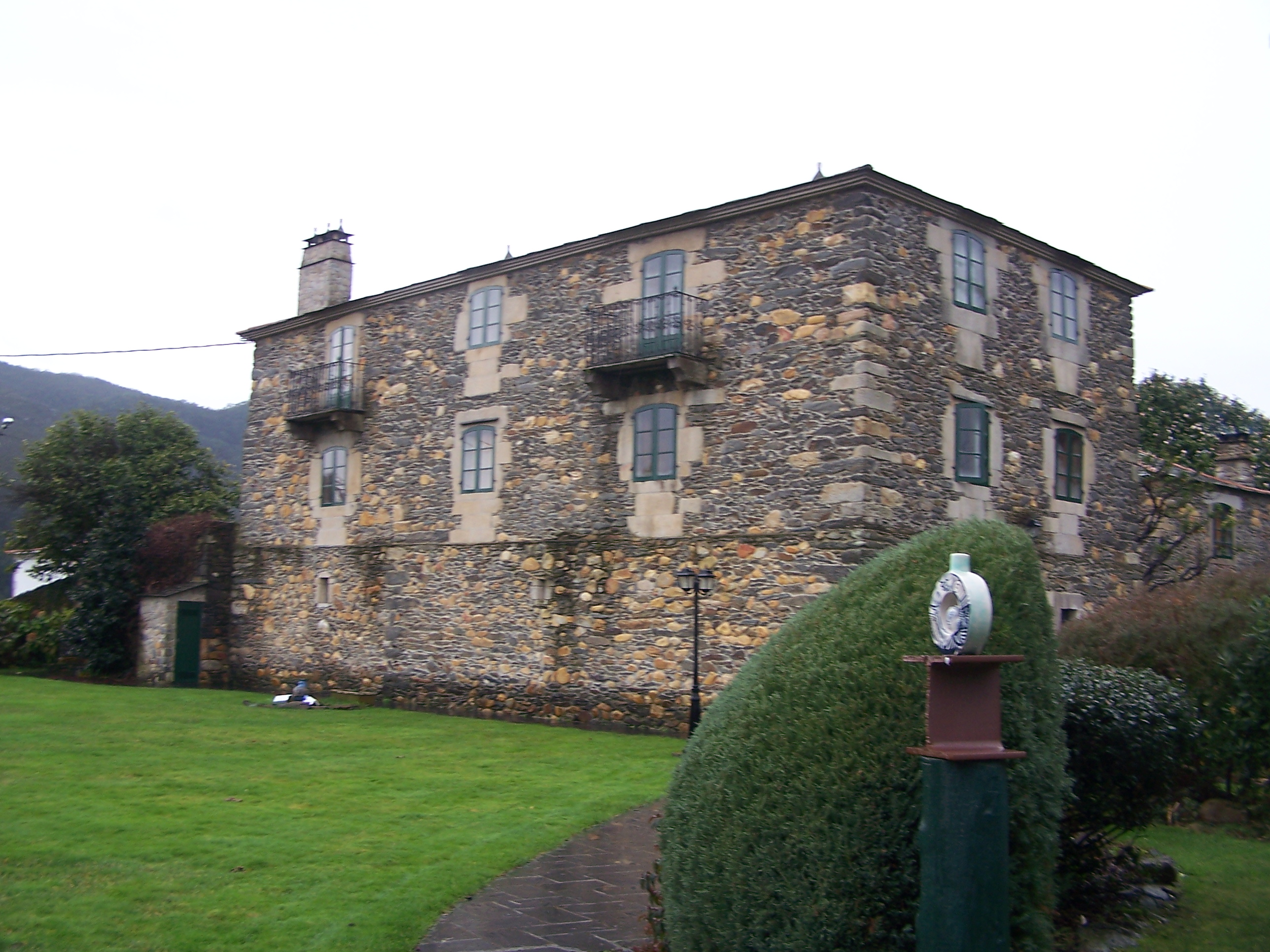 Pazo da Trave, Viveiro